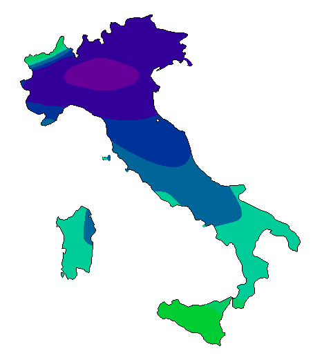 Carta della radiazione solare globale in Italia in ottobre 14 MJ/mq